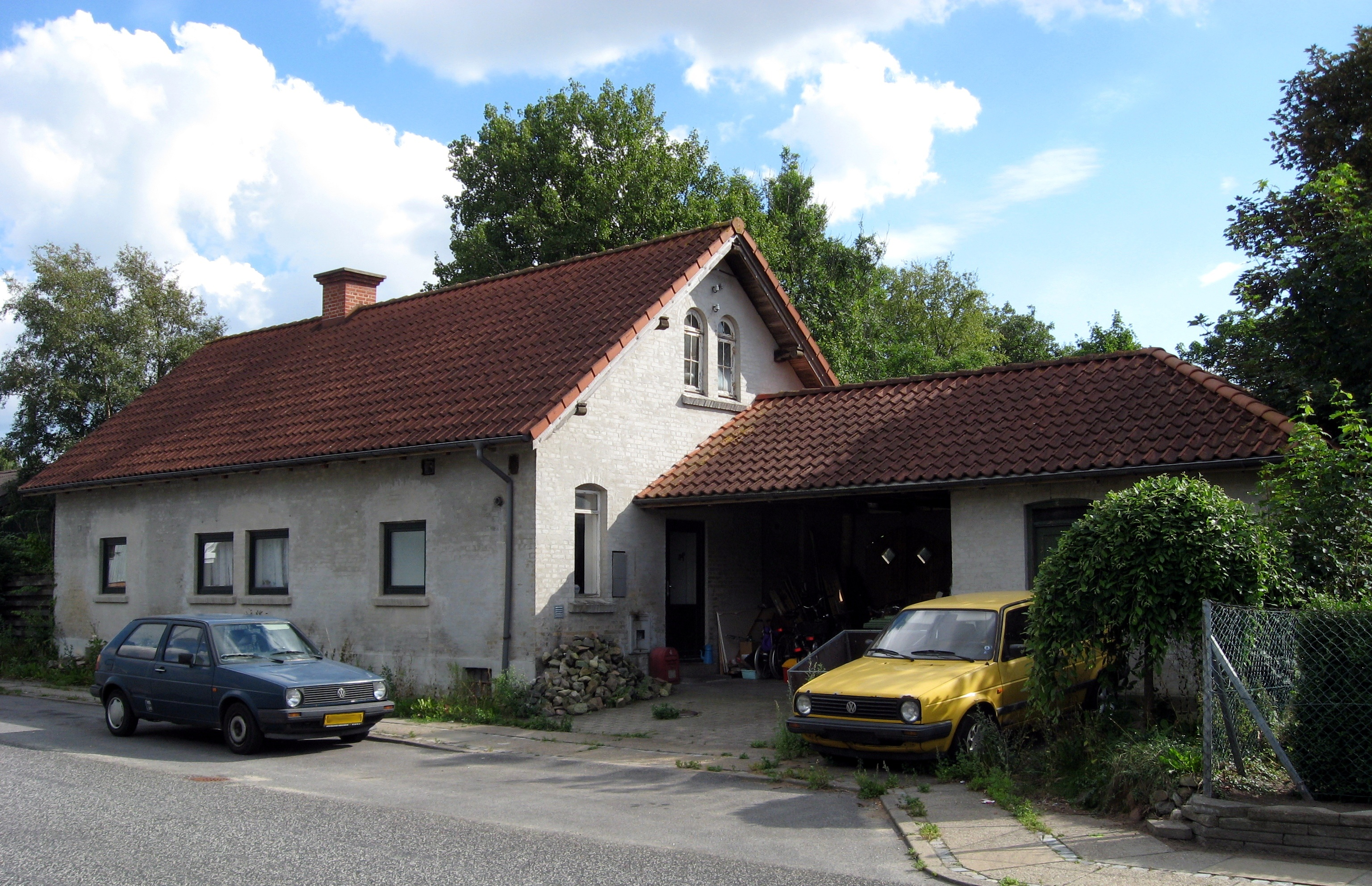 Gl. station i Biersted (Fjerritslev-Frederikshavn Jernbane)